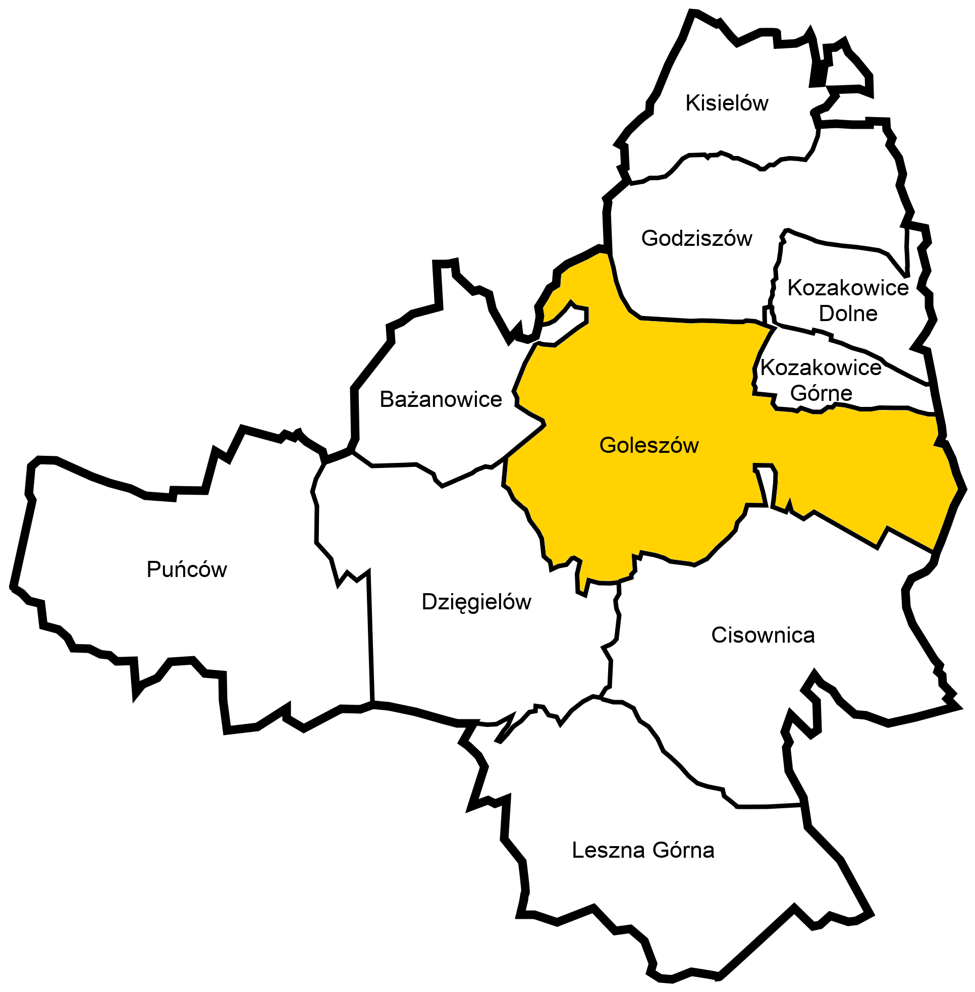 Miejscowość Goleszów na mapie gminy